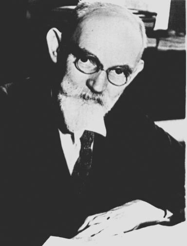 Willem de Sitter (1872 – 1934)